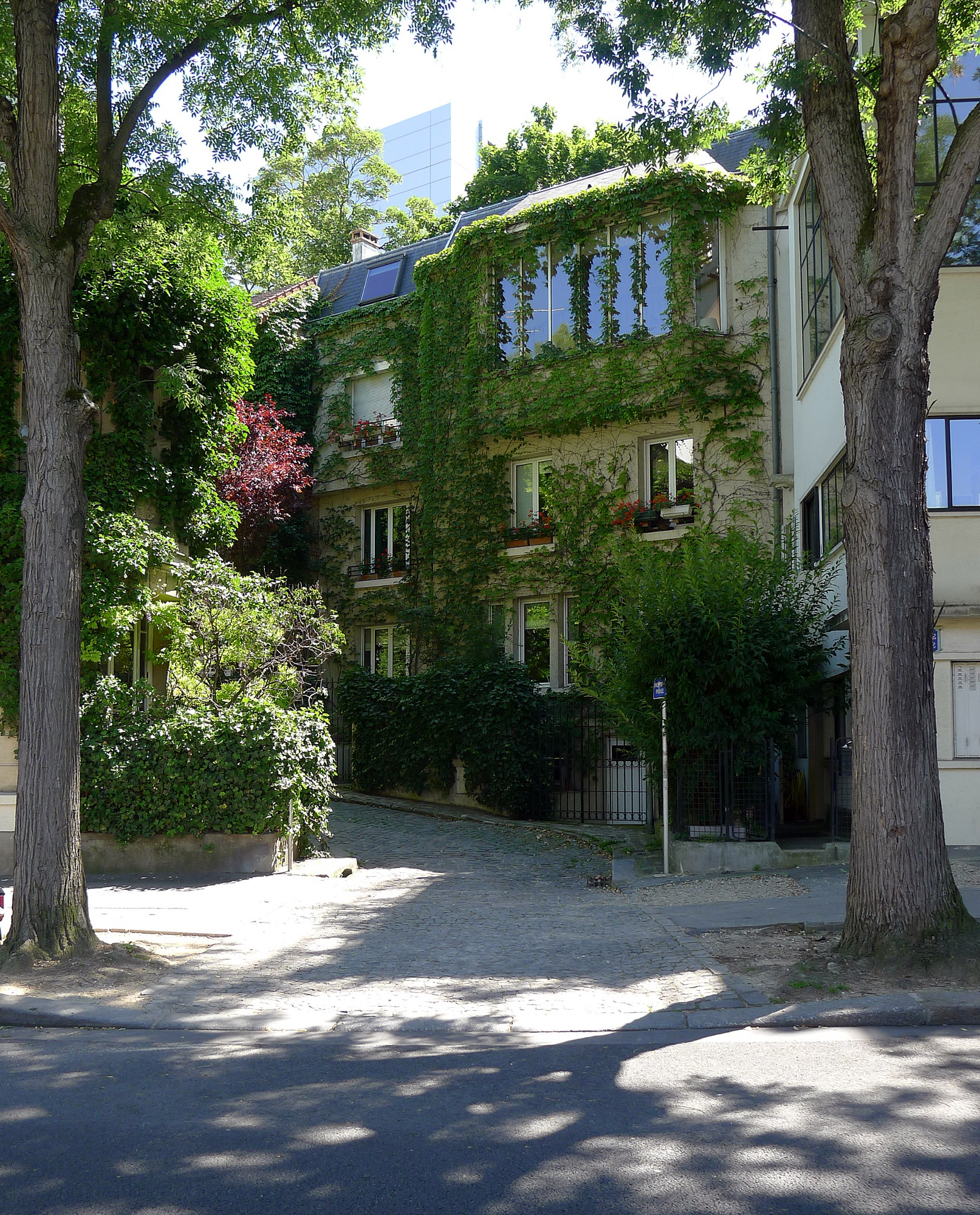 Square de Montsouris (entrée de la vois, côté avenue Reille) - Paris XIV